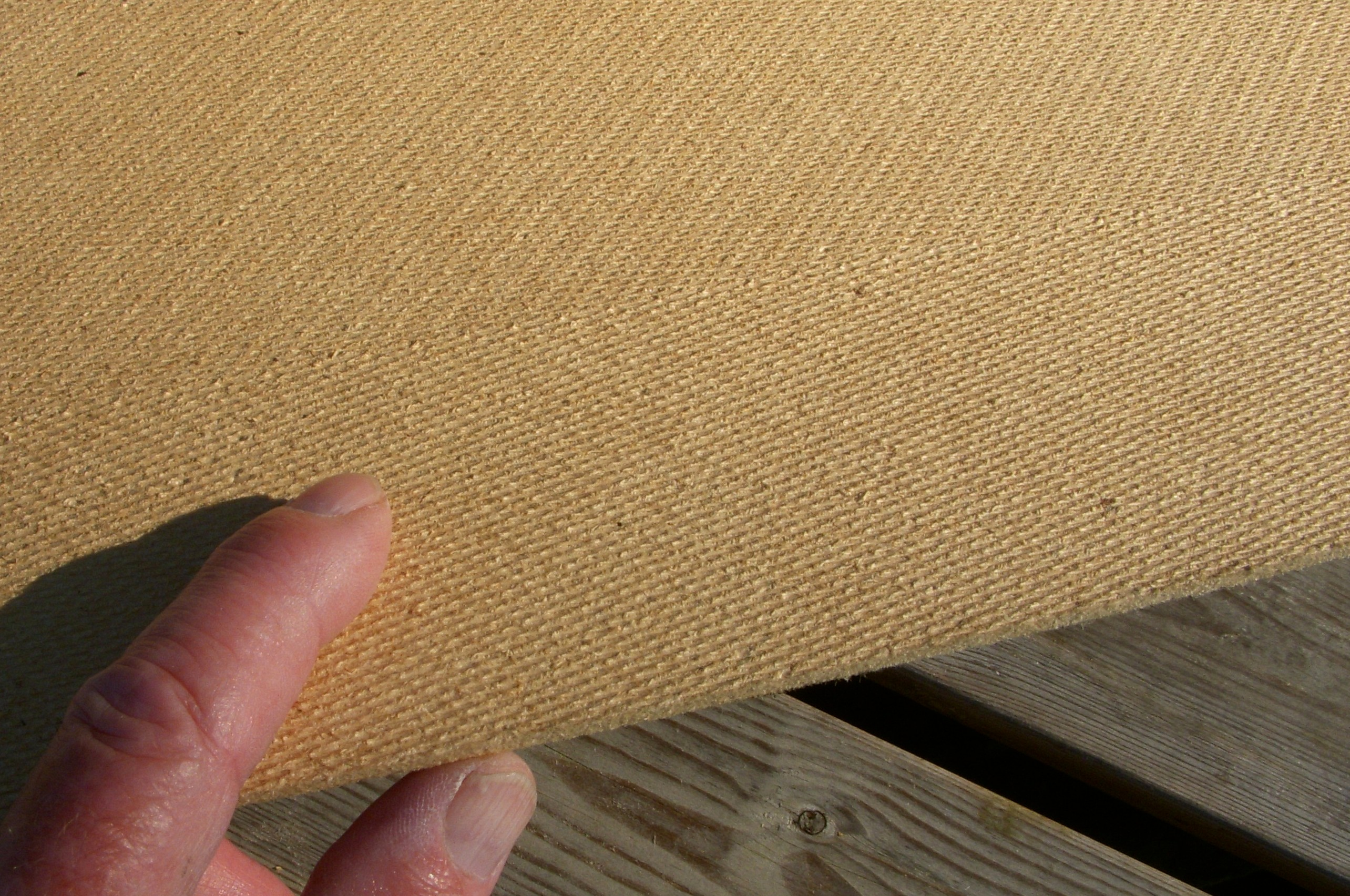 Masonit, 3,4 millimeter (baksidan)